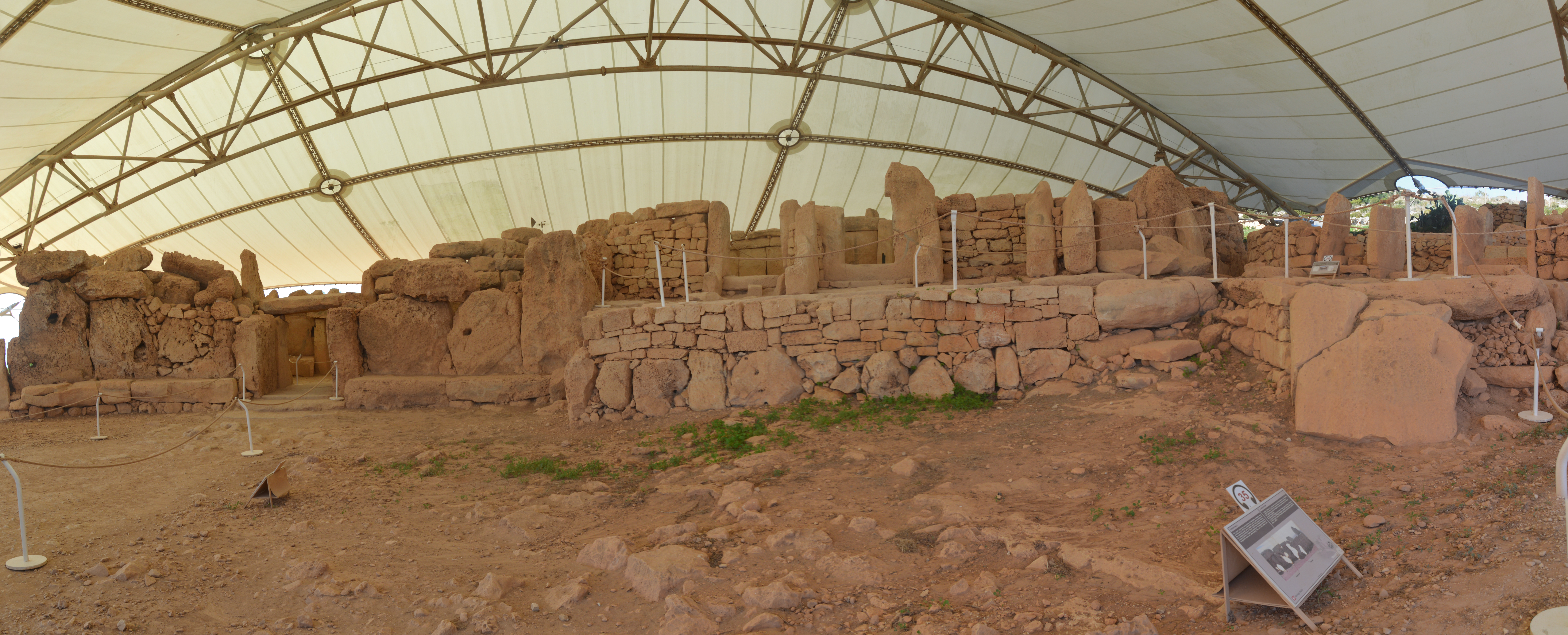 vu panoramique d'ensemble du temple de Mnajdra, Malte